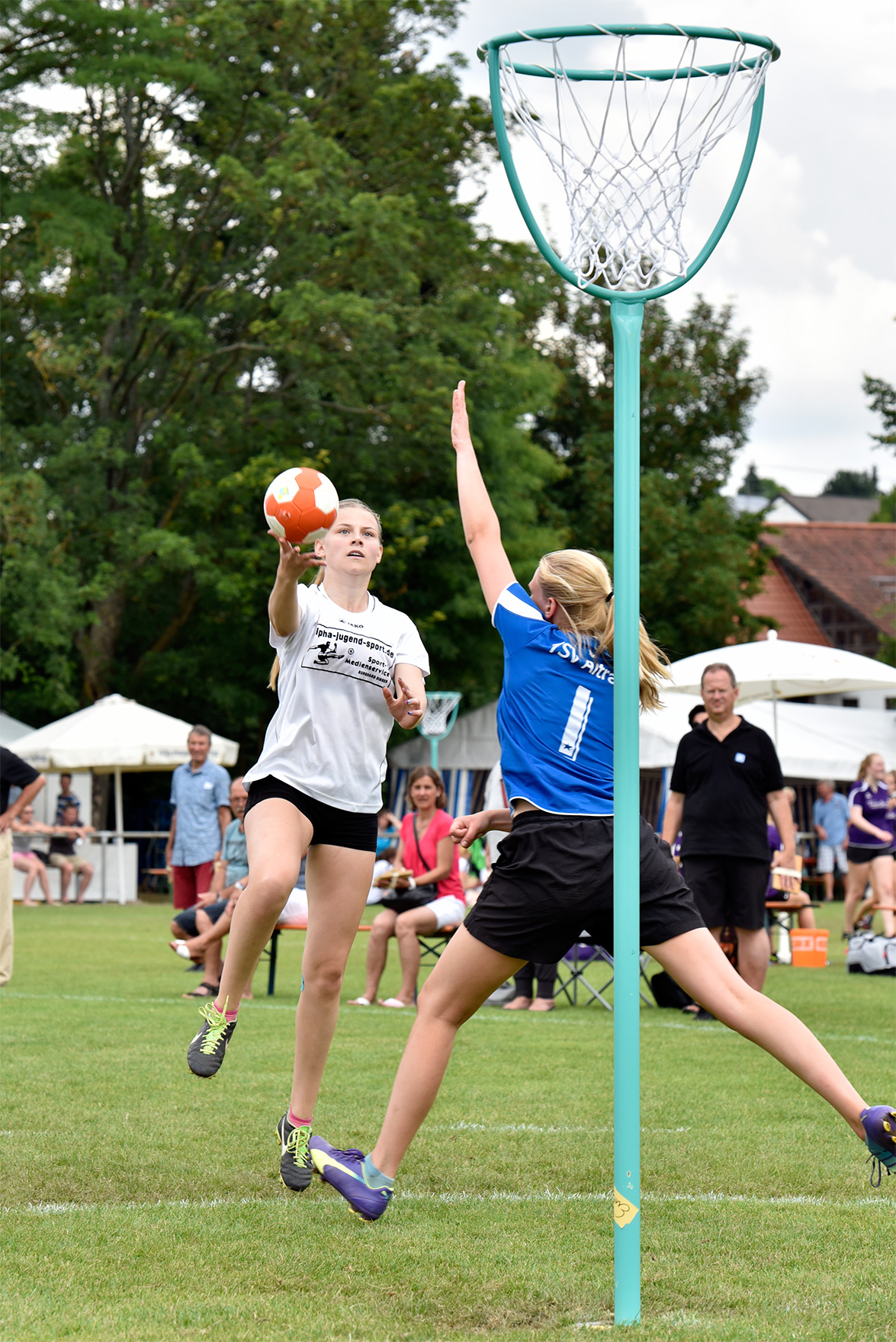 Chiara Nicklaus (VfL Niederwerrn) im Spiel gegen den TSV Aitrang (Altersklasse Jugend 19) bei den Bayerischen Meisterschaften im Feldkorbball 2016 in Euerbach.